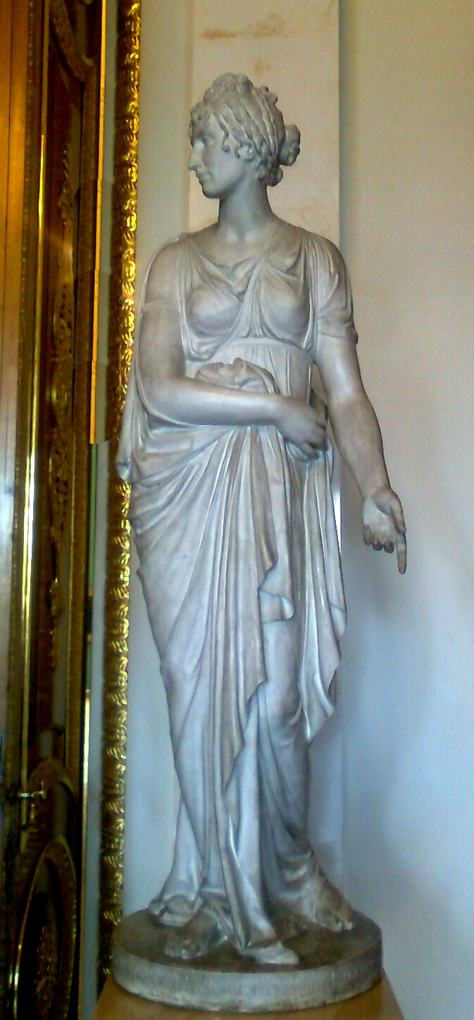 И.П. Мартос. «Надгробие Е.И. Гагариной». 1803. ГРМ